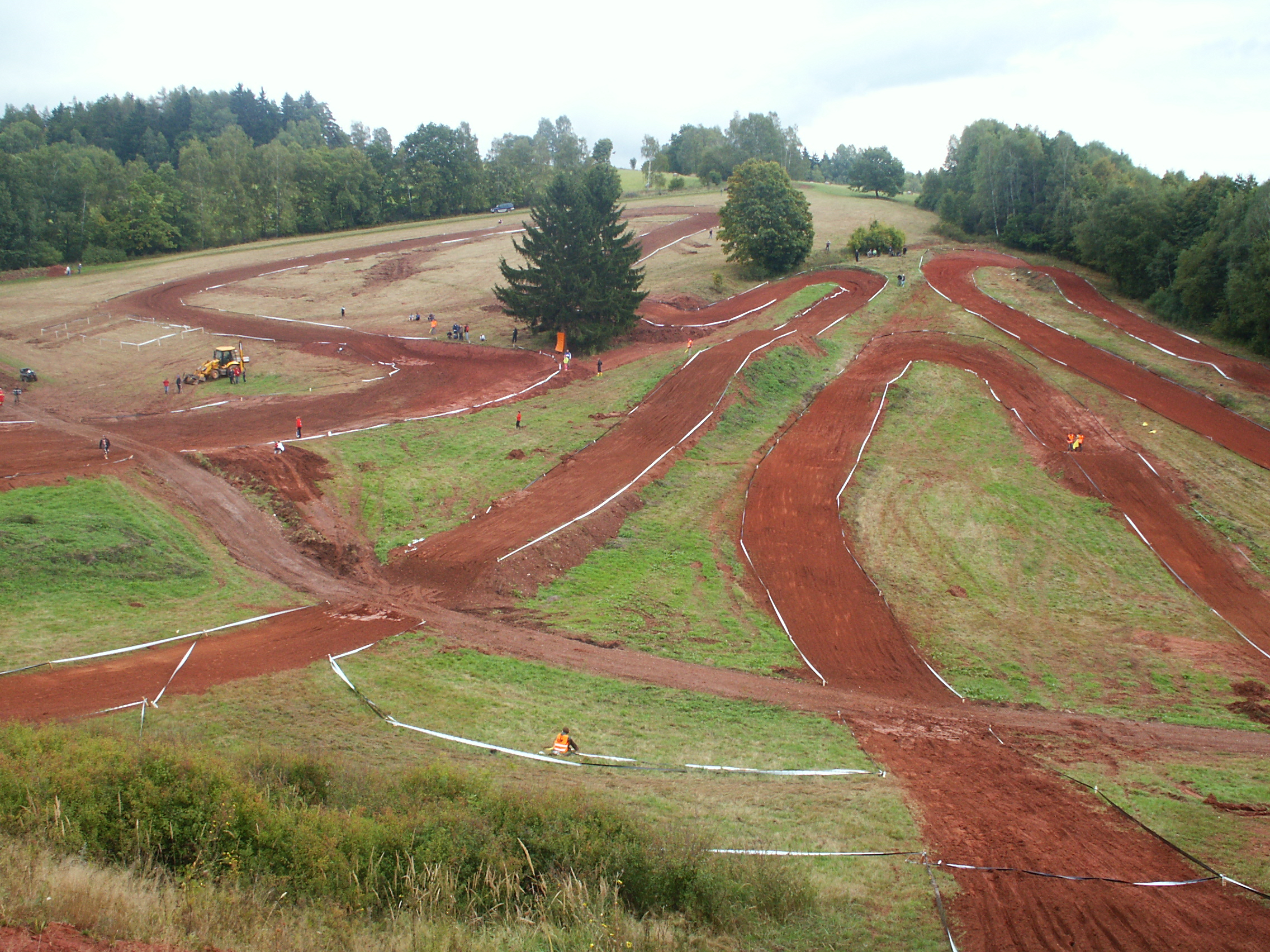 Rudnická rokle 2013 - trať o přestávce mezi závody